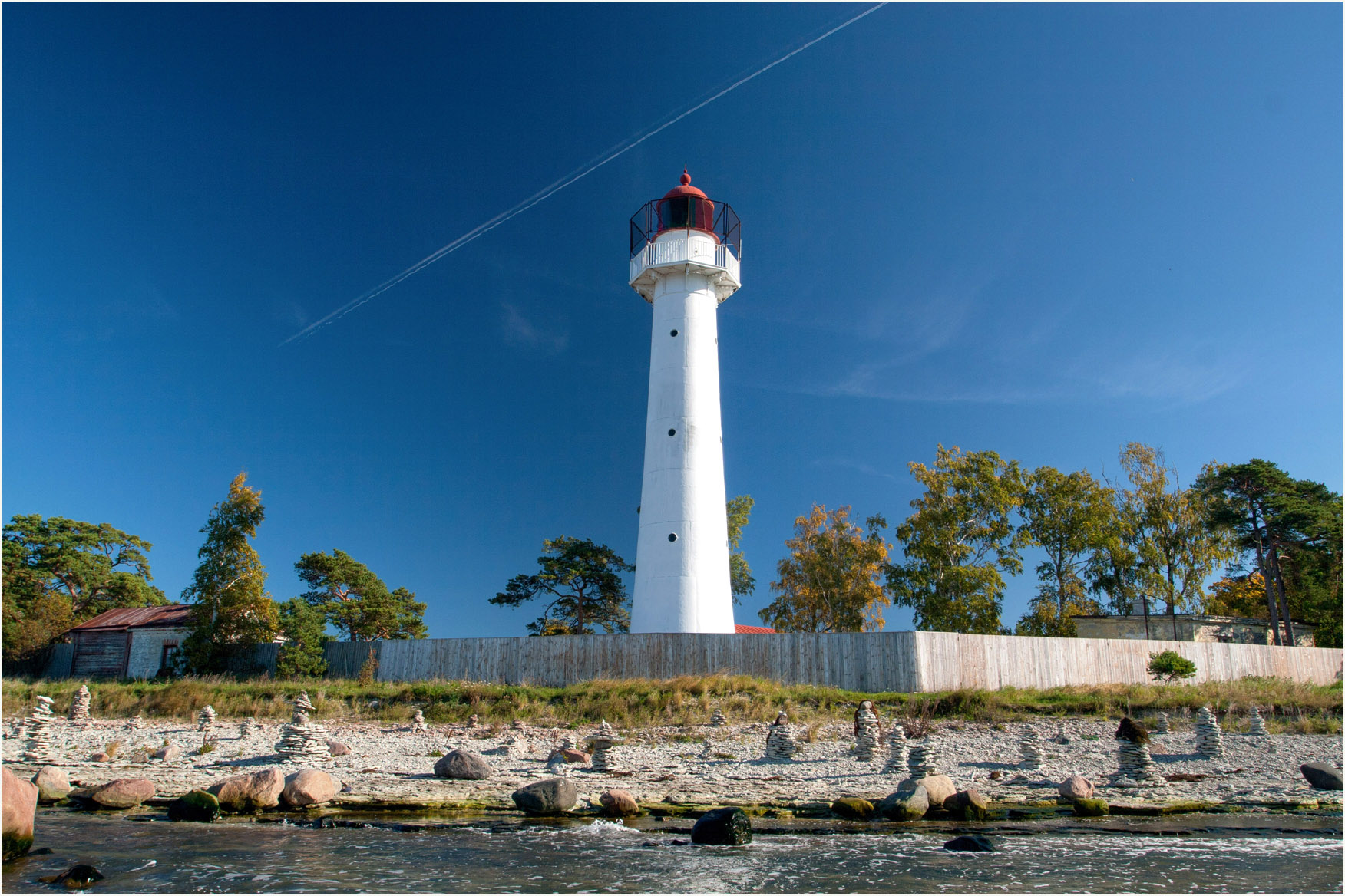 Saxby tuletorn